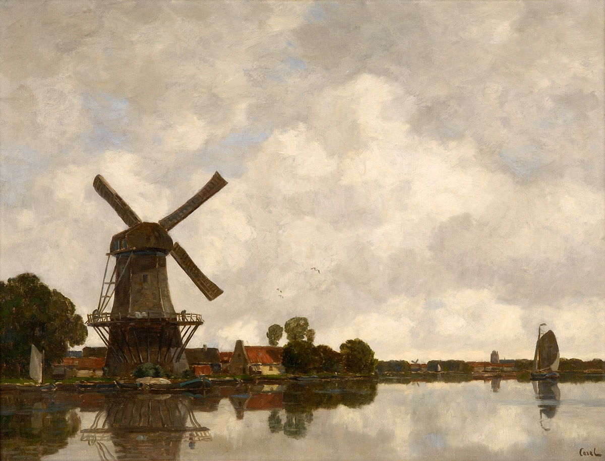 Flußlandschaft mit Windmühle.title QS:P1476,de:"Flußlandschaft mit Windmühle." label QS:Lde,"Flußlandschaft mit Windmühle."